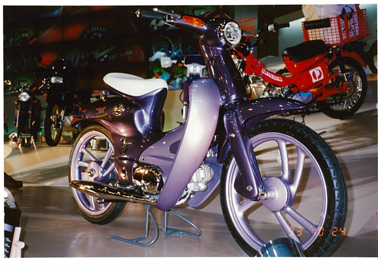 東京モーターショーに出展されたコンセプトモデル